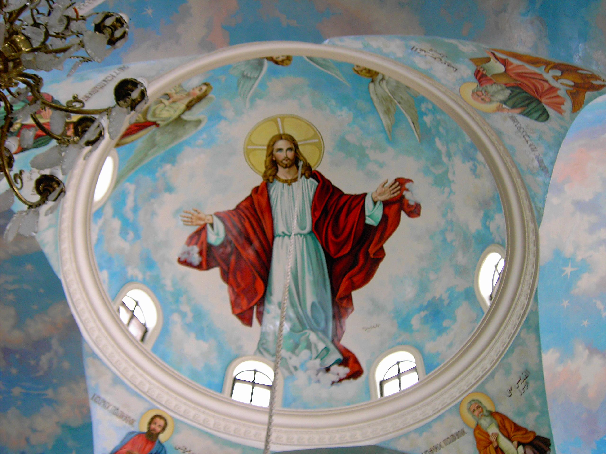 Photo personnelle d'Alexandrie